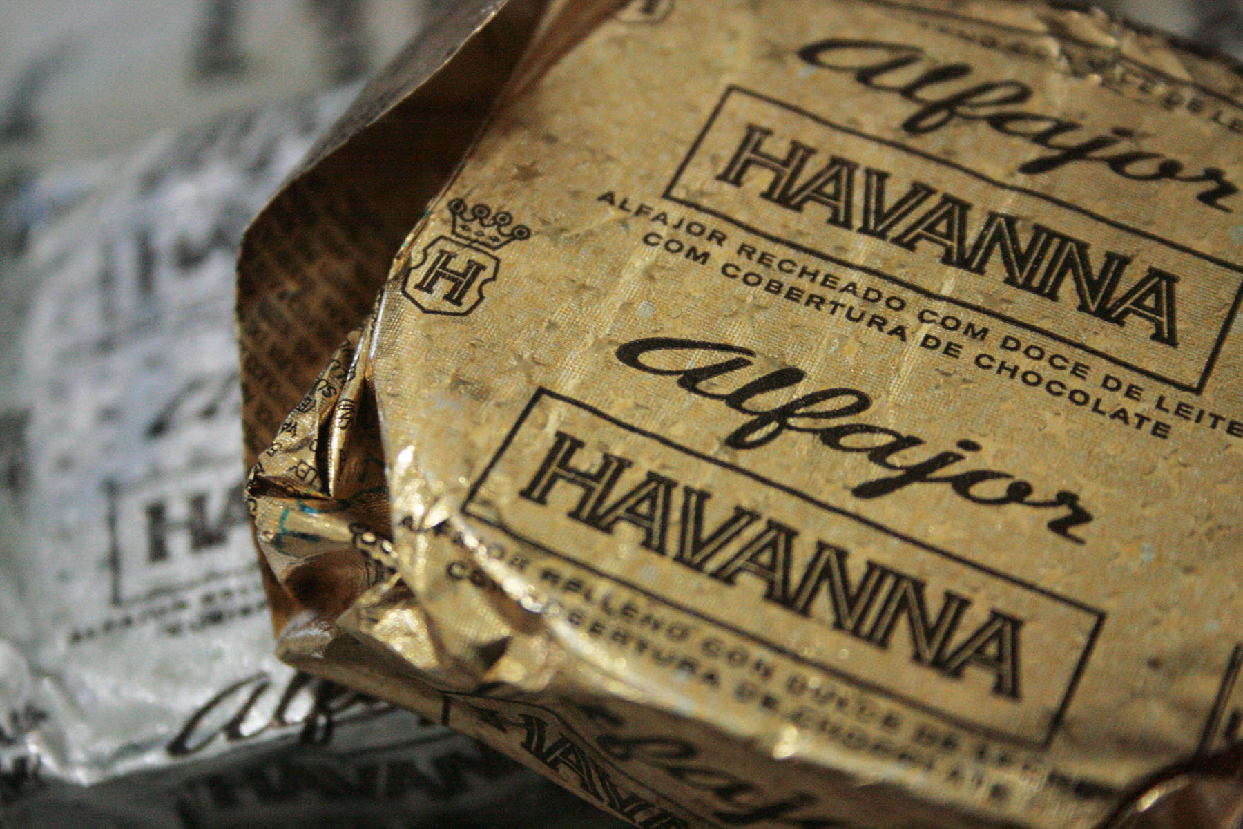 Alfajores de Havanna, considerados entre los mejores de Argentina.